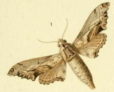 Pl.09-fig.01-Oplerclanis rhadamistus